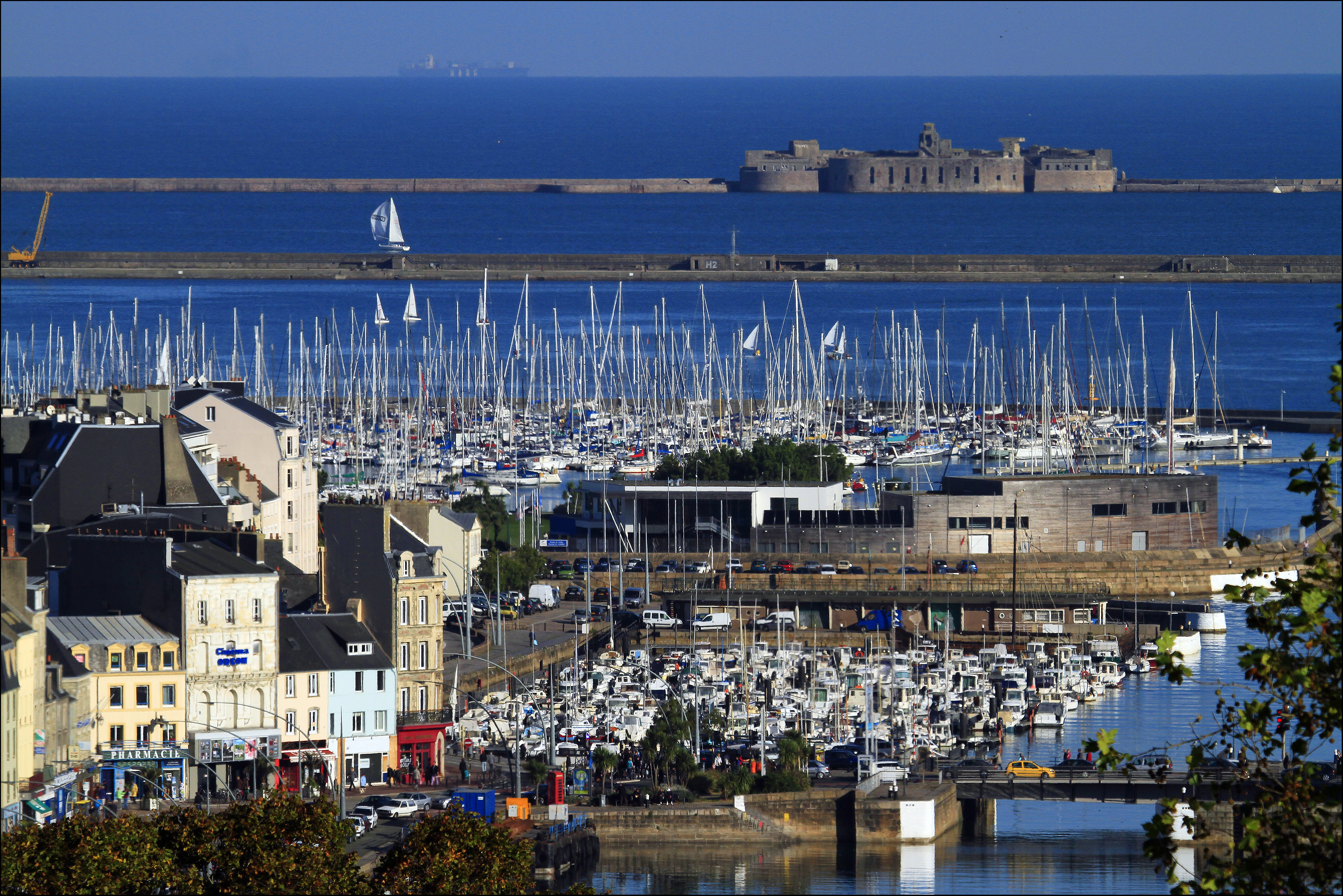 Construit en 1975, puis agrandi en 1992, labellisé Pavillon Bleu depuis 2002, Port Chantereyne est le principal port du littoral Manche. Il compte aujourd’hui 1 560 places à flots réparties sur plus de 25 pontons : 1 300 anneaux sont loués à l’année ; les 250 places restantes sont réservées aux bateaux de passage. Une vingtaine de places est, par ailleurs, dévolue à l'accueil des bateaux traditionnels au sein du port de l'Epi. En 2011, le port a enregistré environ 8 000 passages et 18 000 nuitées. Un important projet d’extension du port à l’ouest est prévu qui permettra d’accroître la capacité d’accueil de 600 bateaux supplémentaires (environ 400 places à flots et 200 à sec).